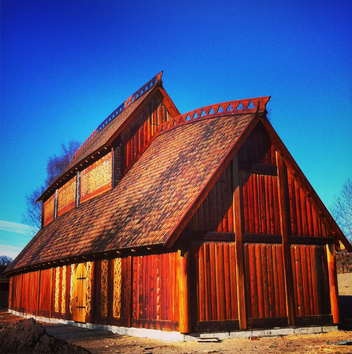 Rekonstruksjon av en gildehall fra vikingtid. Borre, Horten kommune.